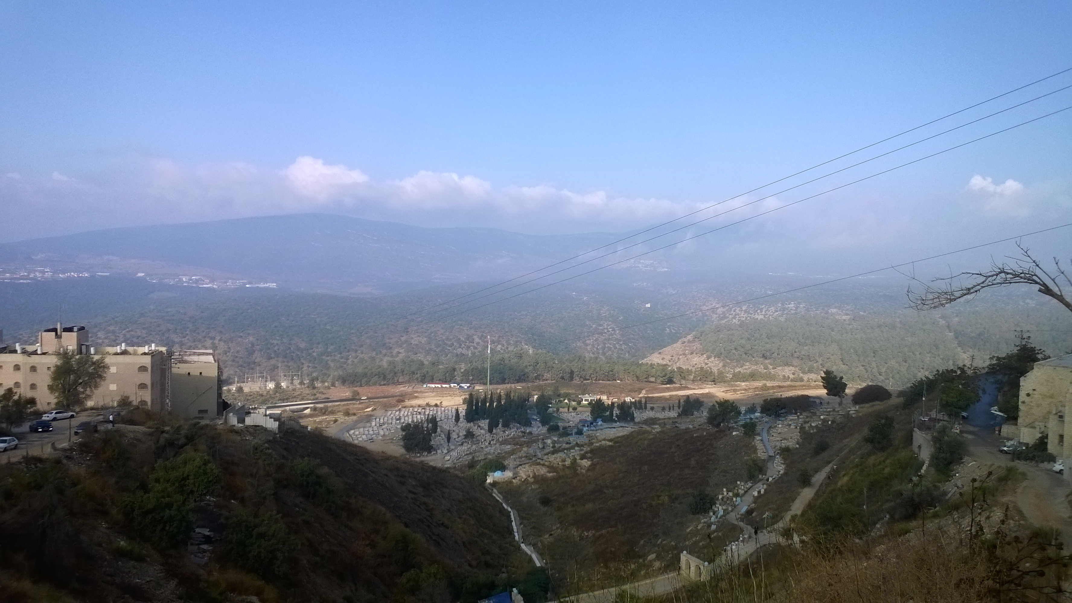 העיר העתיקה של צפת